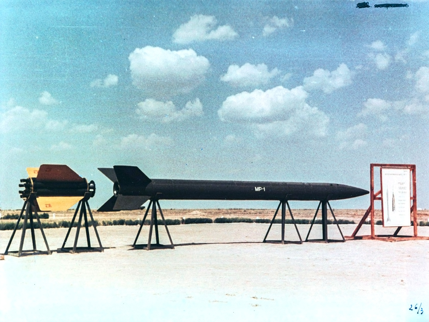 МР-1 — первая советская метеорологическая ракета. В 1952—1959 гг. на полигоне Капустин Яр произведено несколько десятков успешных пусков этой ракеты.